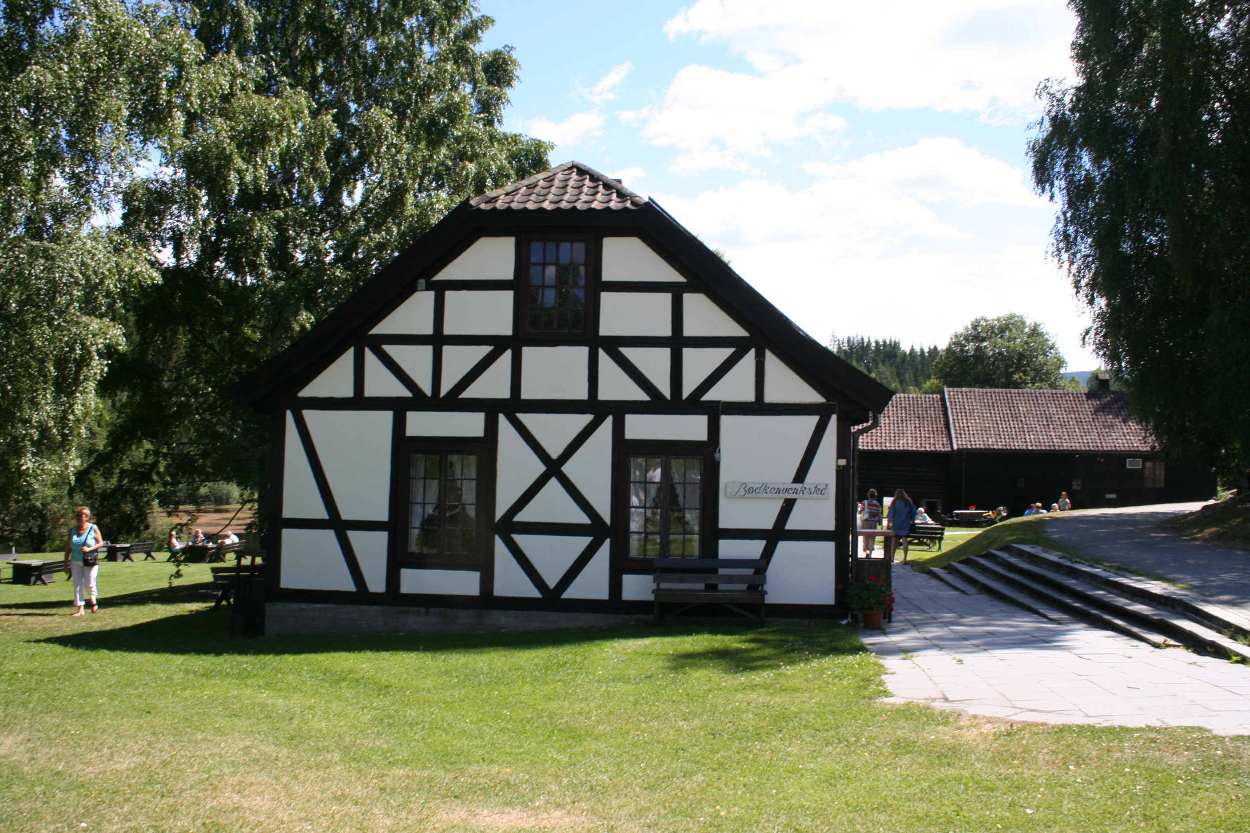 Bygningen som huset bødtkerverkstedet på Blaafarveværket.